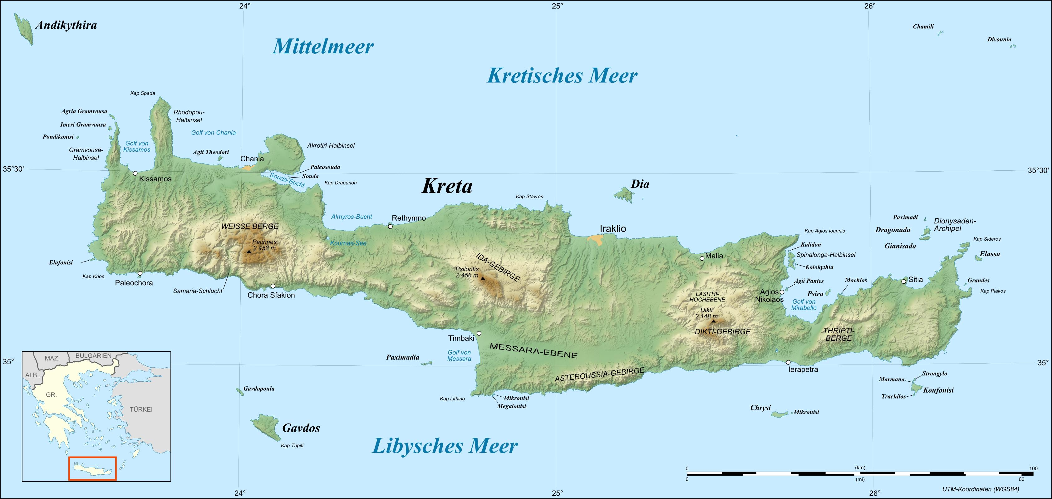 Selbst erstellt aus unten genannter Datei, Export aus Inkscape als PNG (1960 kb) umgewandelt in JPG in 85% (356 kb) zwecks schnellerer Ladezeiten